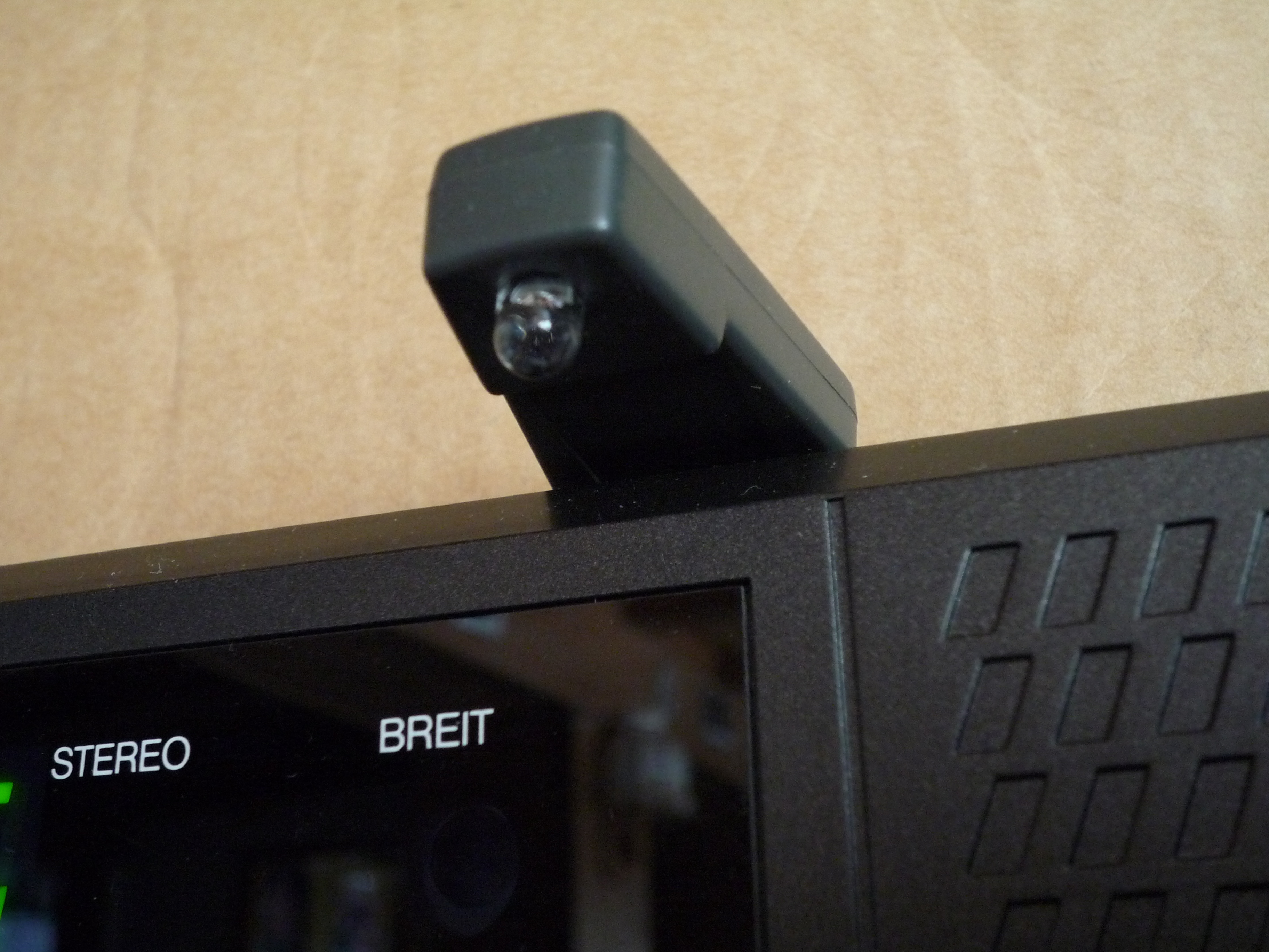 G-Link-Anschluss auf einem analogen Satellitenreceiver